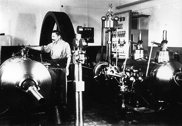 Maszyna parowa. 1925 rok.